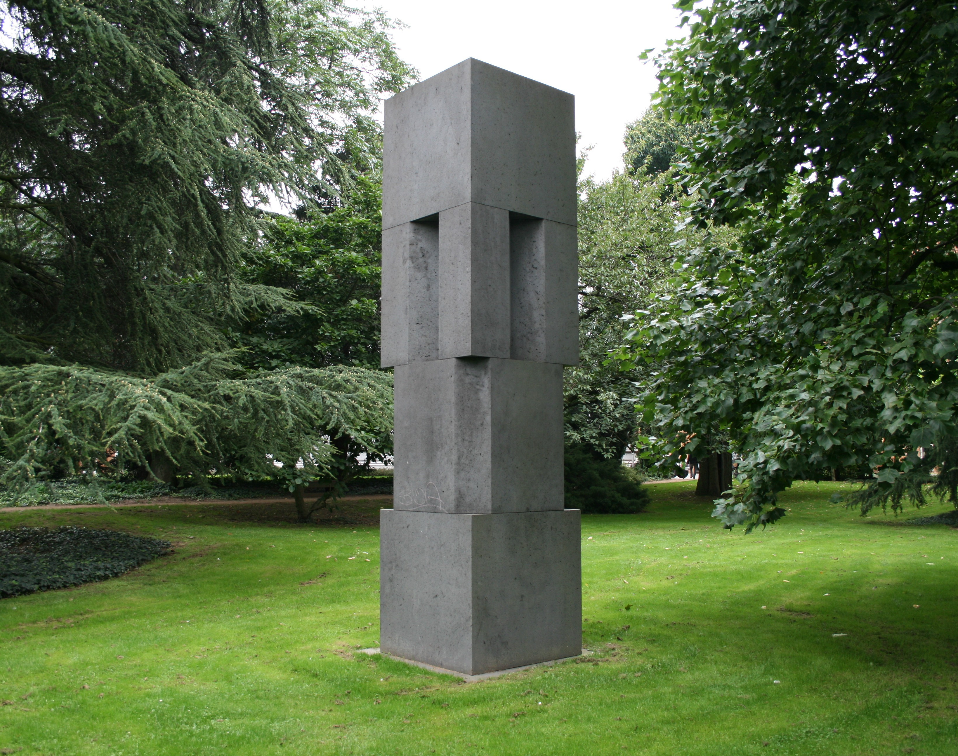 Skulptur "" in der Skulpturensammlung Viersen. Selbst fotografiert.